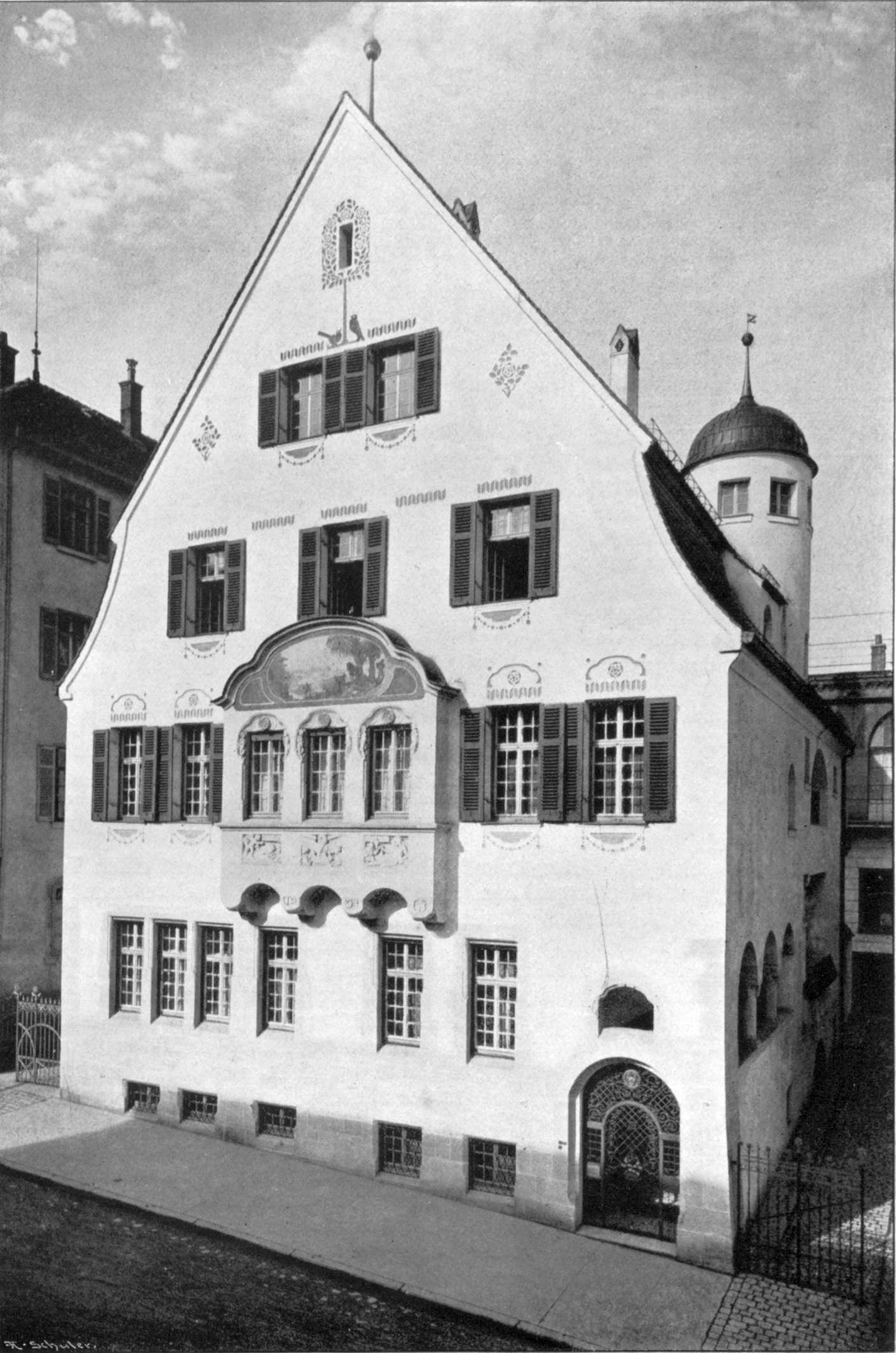 Ehemaliges Haus Zeller, Straßenansicht, Foto, 1903, Stuttgart, Reinsburgstraße 20, Architekt: Theodor Fischer.